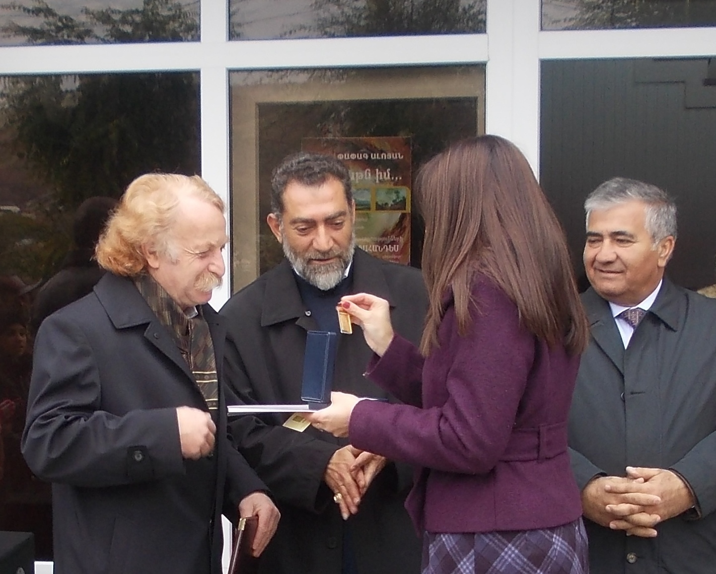 ՈՍԿԵ ՄԵԴԱԼԻ ՀԱՆՁՆՄԱՆ ԱՐԱՐՈՂՈՒԹՅՈՒՆ